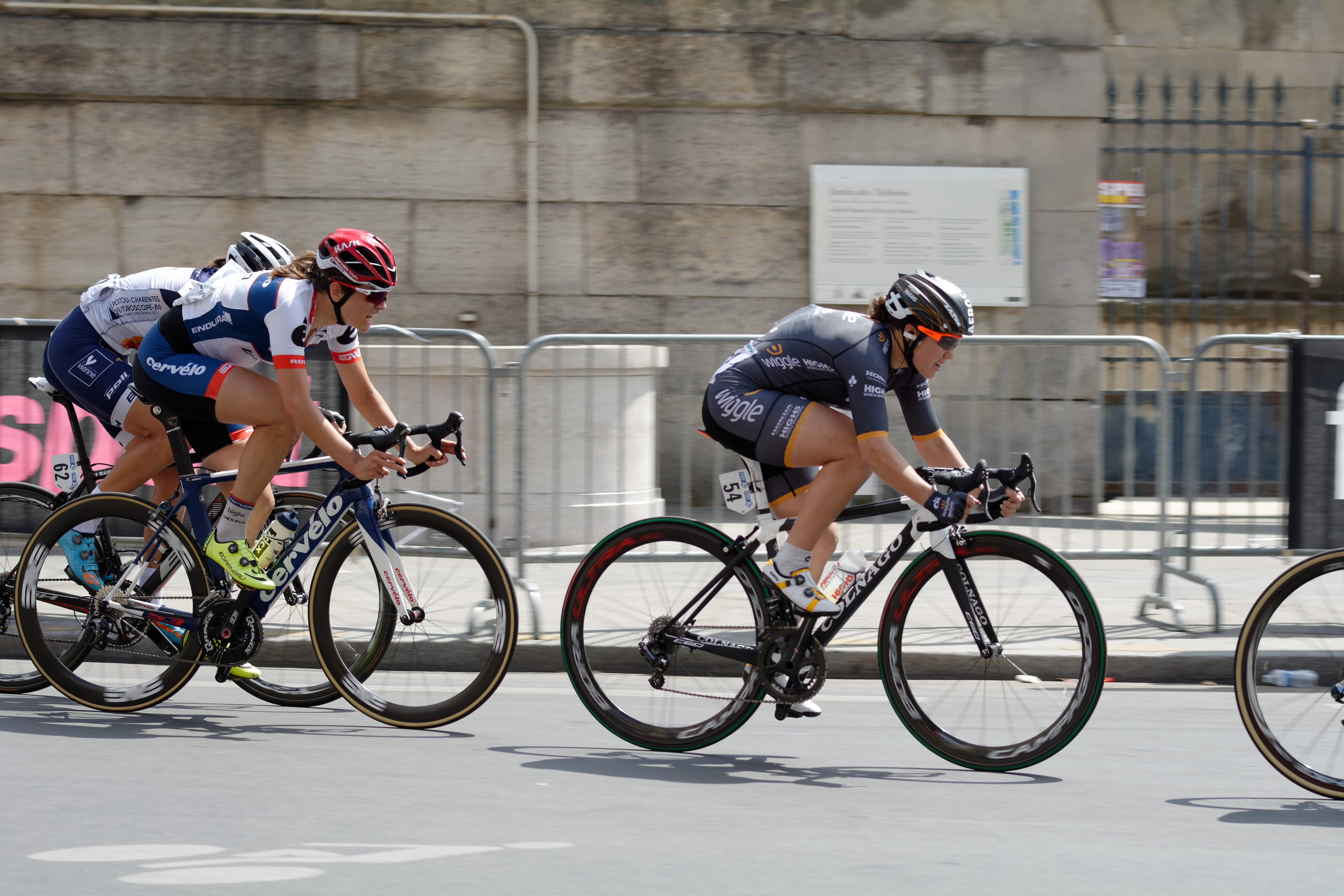 D71_9650_DxO